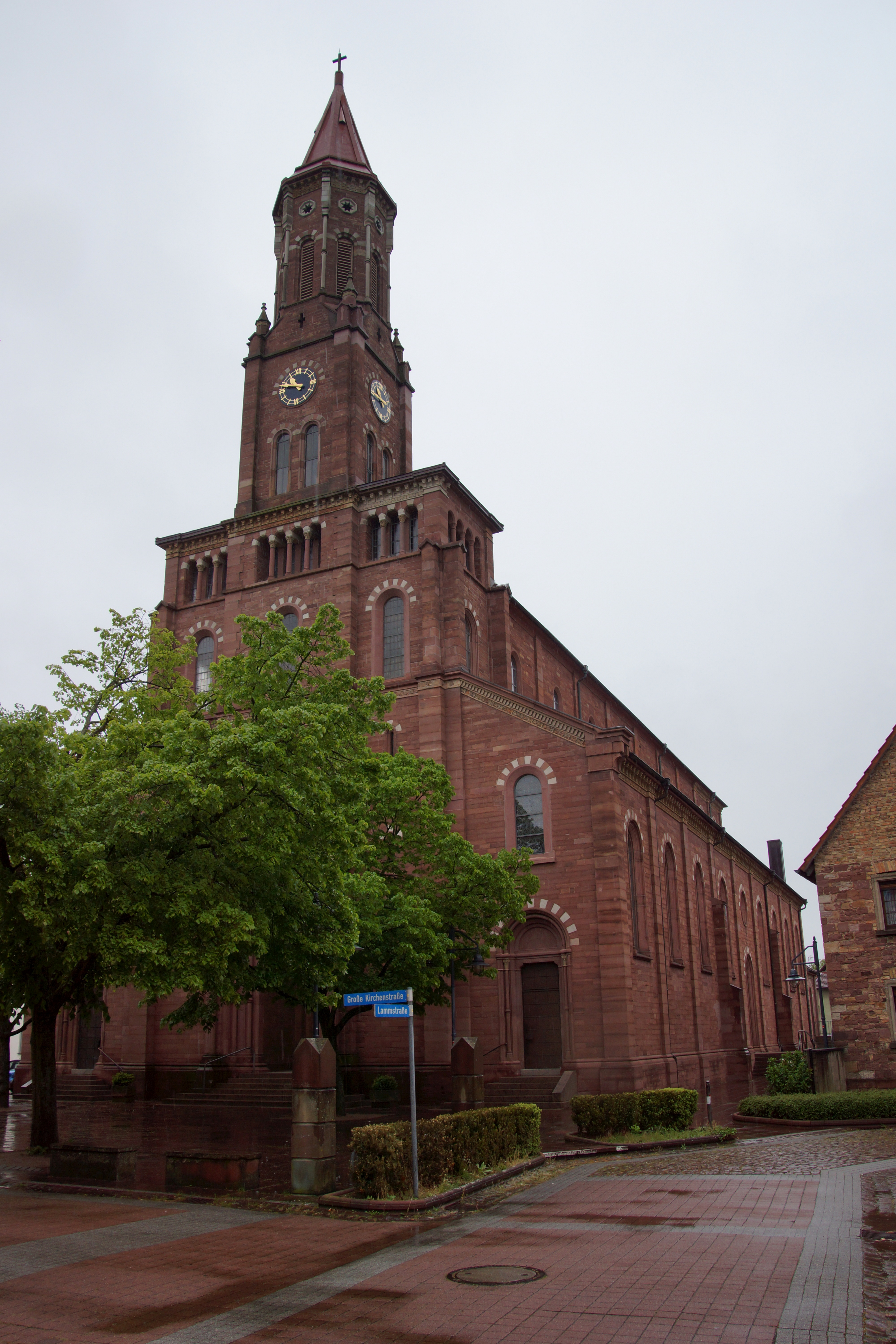 Die katholische Pfarrkirche St. Ulrich in Mörsch, Kreis Karlsruhe